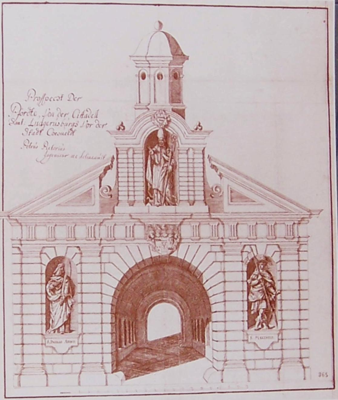 Zeichnung des Haupttores der Zitadelle Ludgerusburg Coesfeld von Peter Pictorius d. Ä. (nach 1667/68). Aus: Das Bistum Münster - Band 4 "Heilige, Wallfahrten, Klöster" S. 9; Verlag Edition du Signe´ Straßburg 1996; ISBN 2-87718-446-3